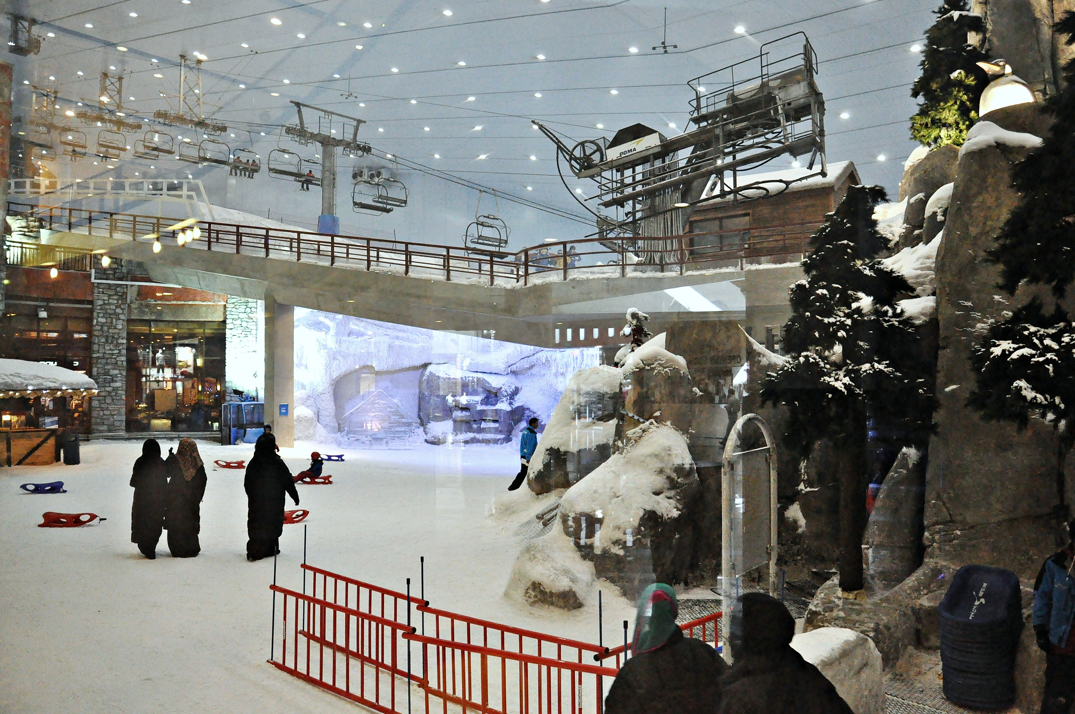 emiratos arabes